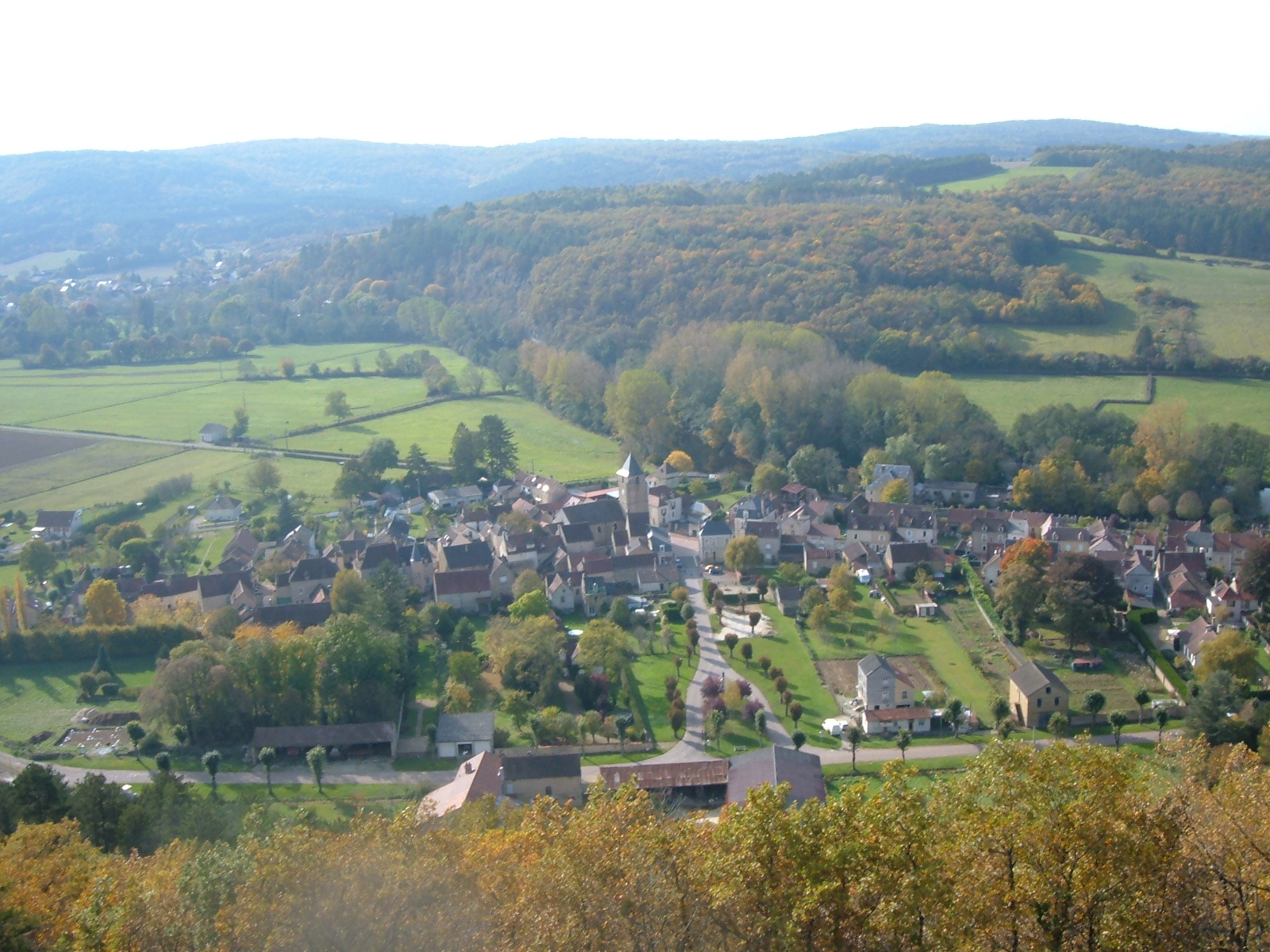 Sermizelles (Yonne) : vue du village depuis la tour Malakoff